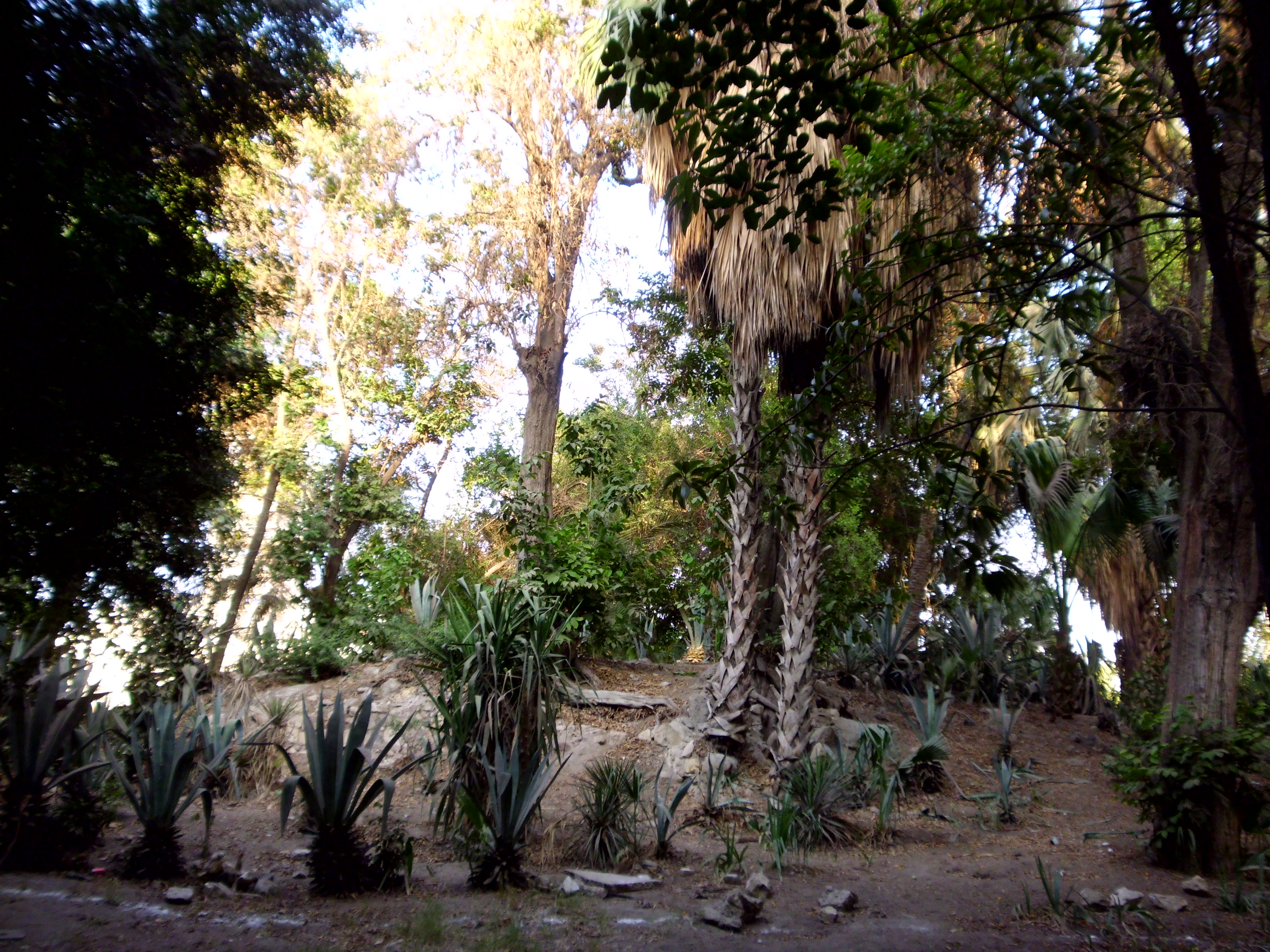 حديقة الازبكية